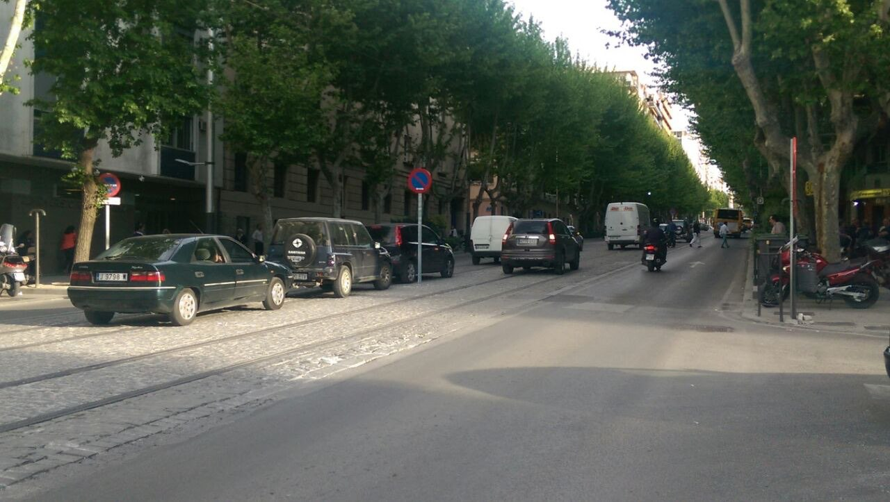 Vehículos aparcados en la plataforma del Tranvía de Jaén en abril de 2015, debido al abandono de la infraestructura.